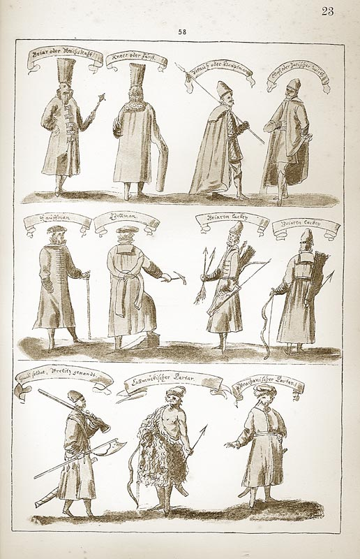 Мужские костюмы русские и инородческие